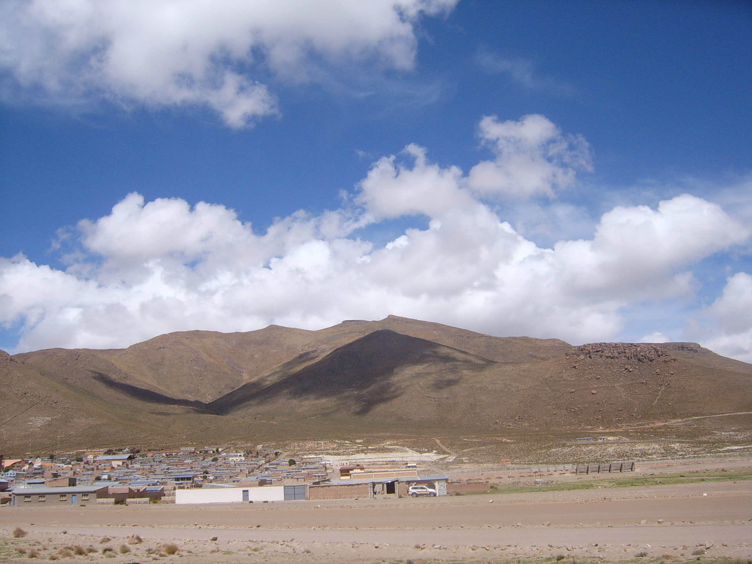 vista panoramica de Huachacalla